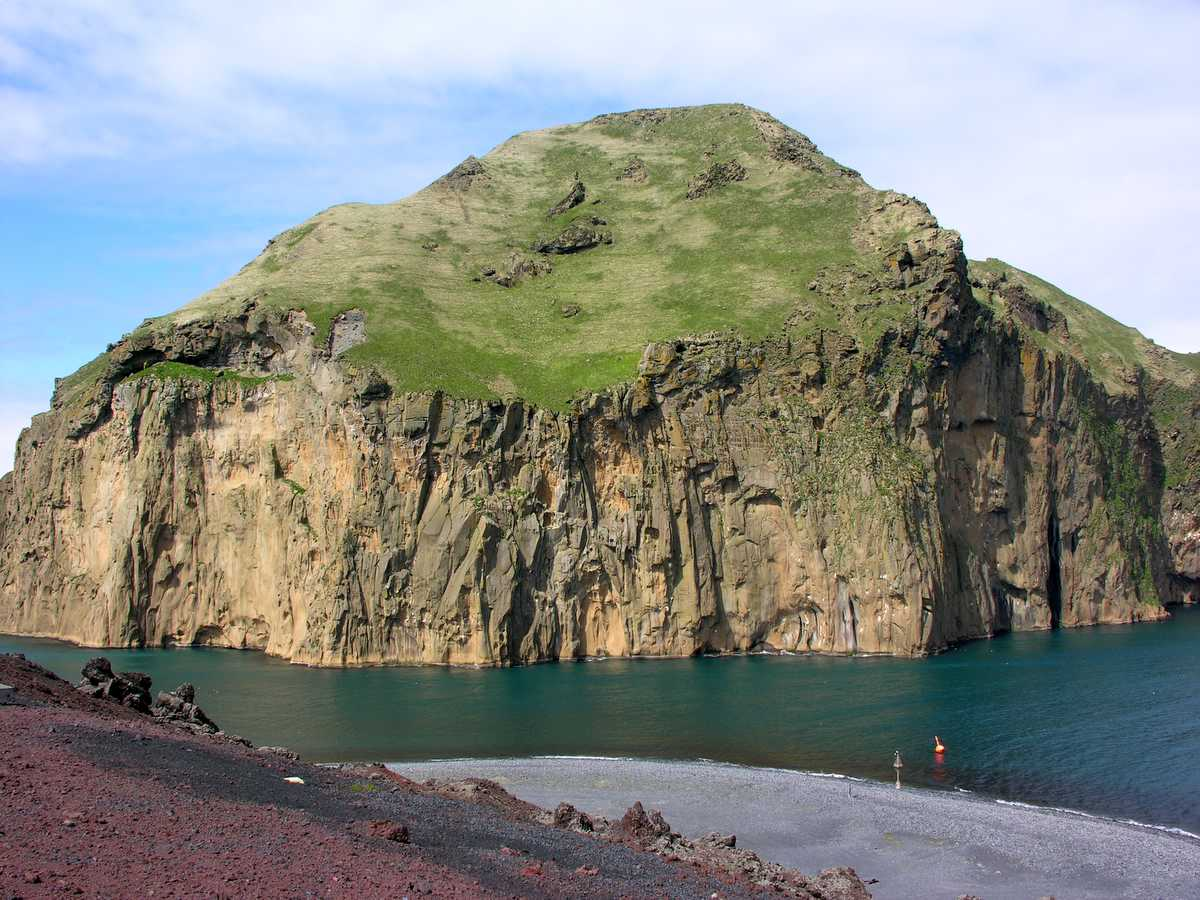 Vestmannaeyjar, Iceland